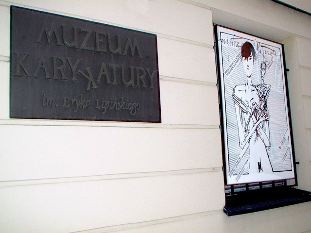 Tablica na warszawskim Muzeum Karykatury im. Eryka Lipińskiego. Obok plakat z wystawy "Mistrz i Małgorzata, czyli Tomasz Jura i Małgorzata Lazarek" (prezentowanej zimą 2005/2006)